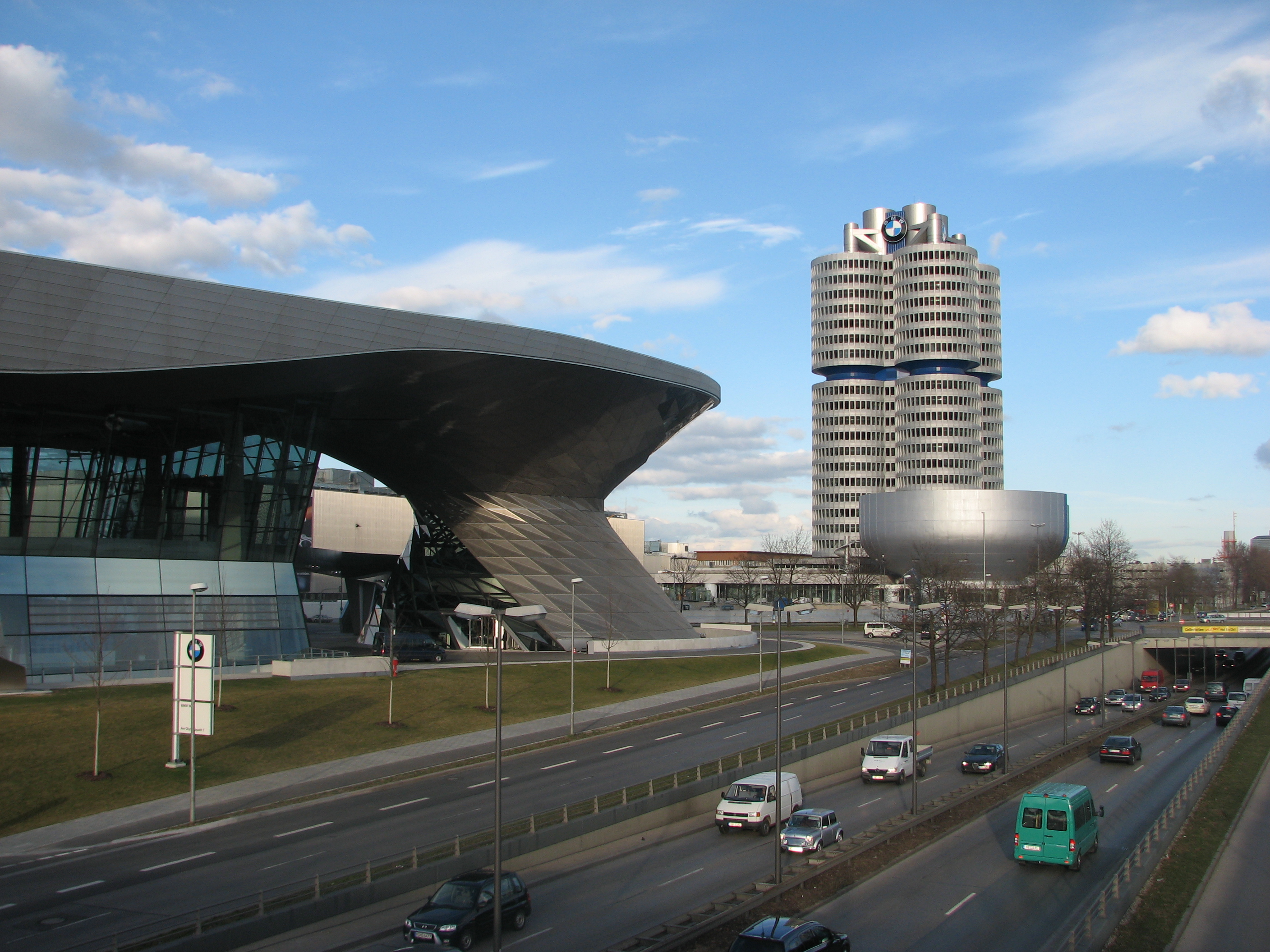 BMW Welt + BMW headquater + BMW Museum